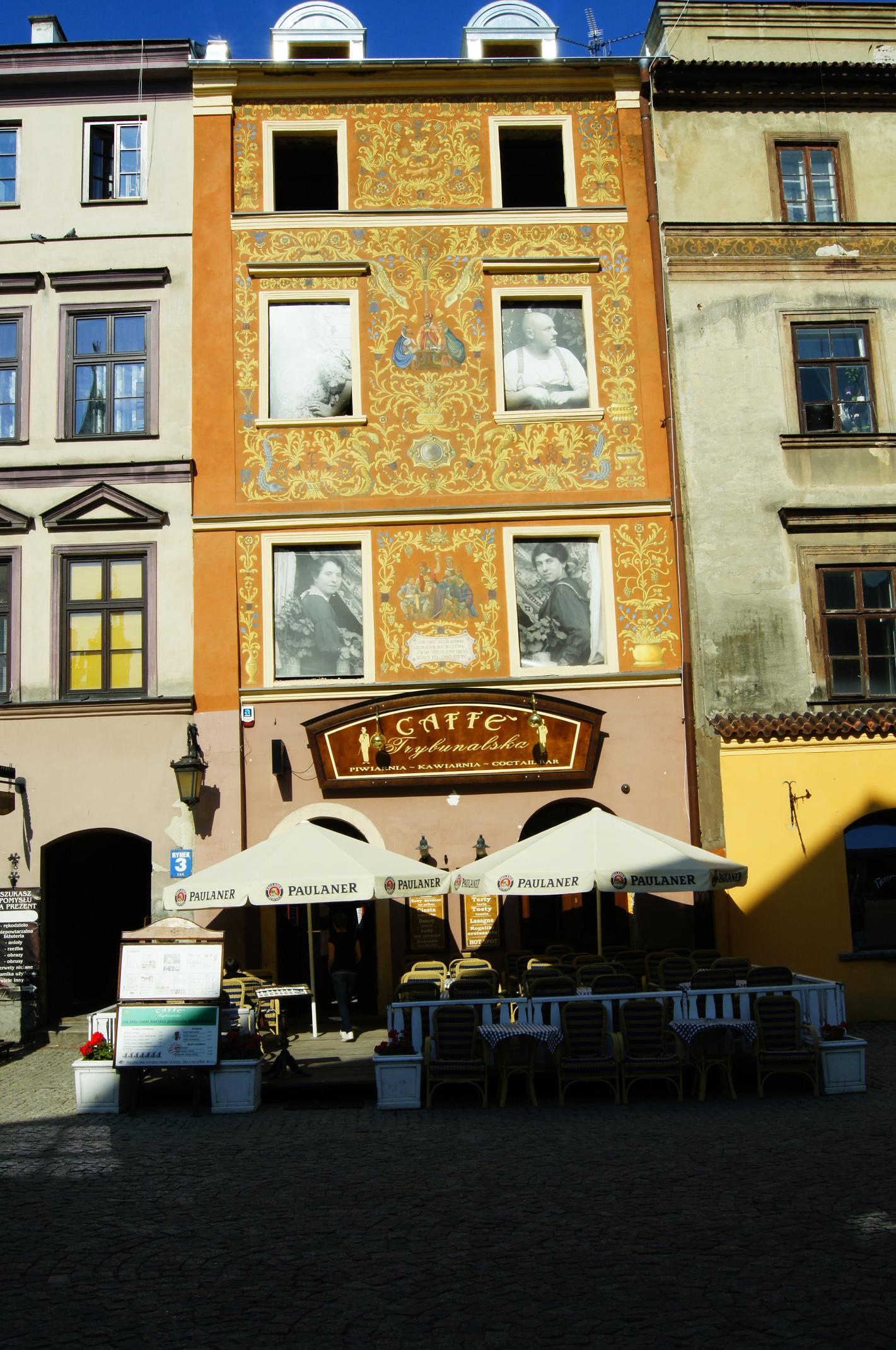 Lublin, Rynek 4 - kamienica (zabytek nr A/488 z 20.03.1971)